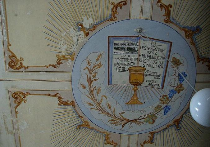 A korábbi mennyezet. Abaújvár.